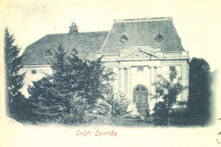 Tata (dt. Totis) in Ungarn, das Gebäude wurde 1913 abgerisen